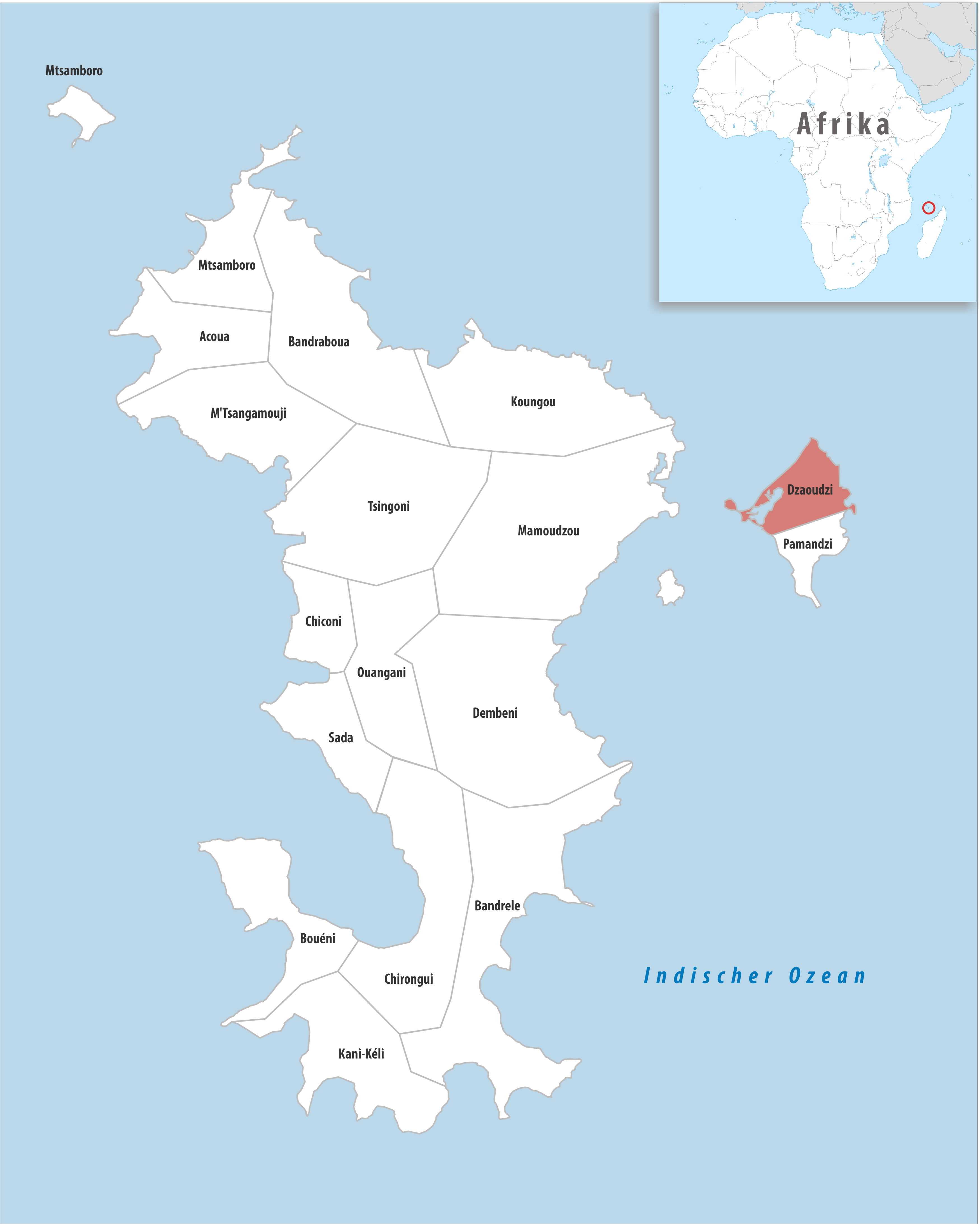 Lage der Gemeinde Dzaoudzi